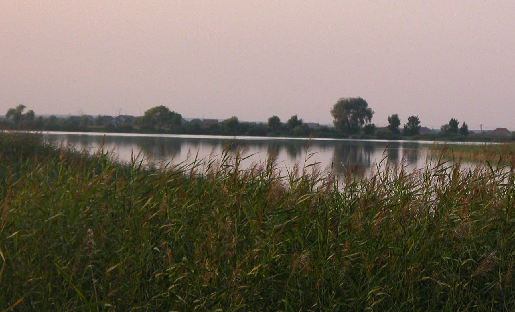 Белое озеро